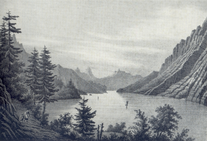 Strasse beim Walensee nach Mols, 1826 47°6′58″N 9°18′0″E / 47.11611°N 9.3°E